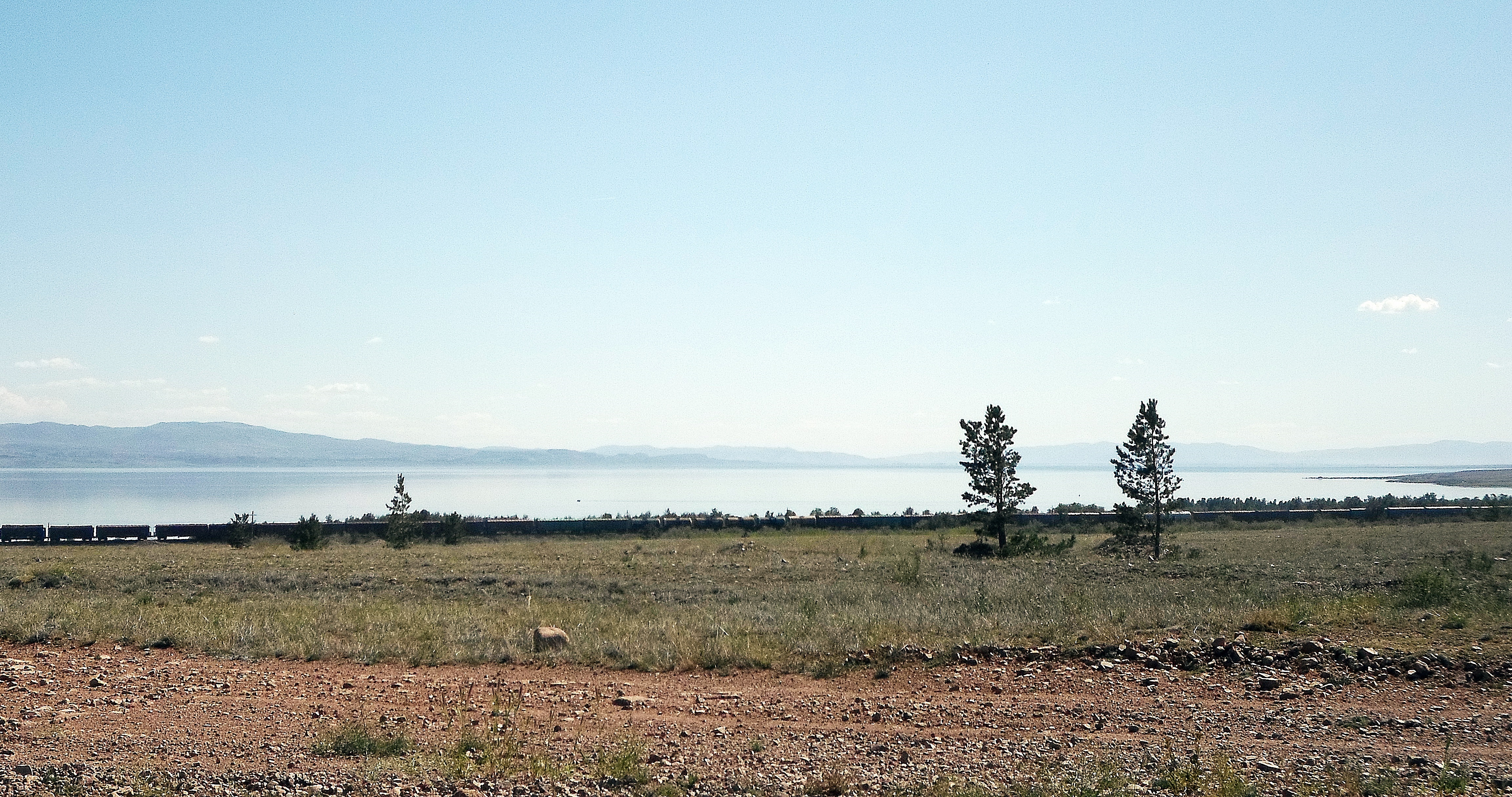 Гусиное озеро. Вид с севера. Поезд на южной ветке ВСЖД Улан-Удэ — Наушки.